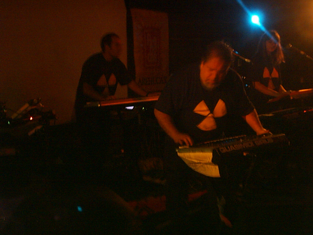 Aviador DRO en concert